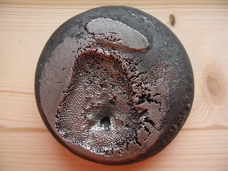 Внутри булатного слитка образуется развитая дендритная решетка, пронизывающая весь объем слитка и выходящая даже на поверхность, что хорошо видно на снимке.